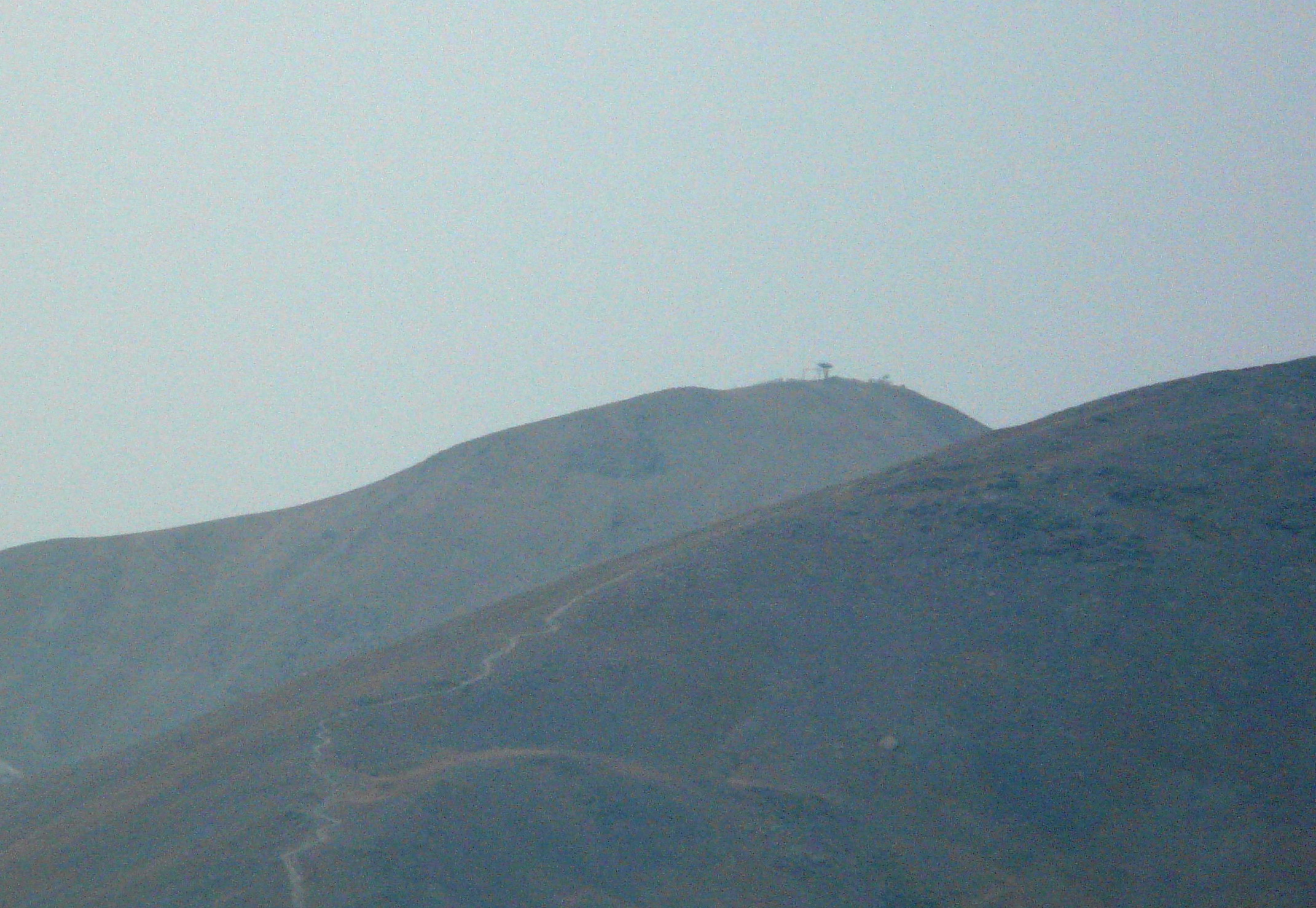 La Tossa del Pas dels Lladres vista del Balandrau. Al cim s'hi endevinen les instal·lacions dels remuntadors de l'estació d'Er-Puigmal. La carena que tapa la vista és l'estribació del Puigmal que baixa per Fontalba.